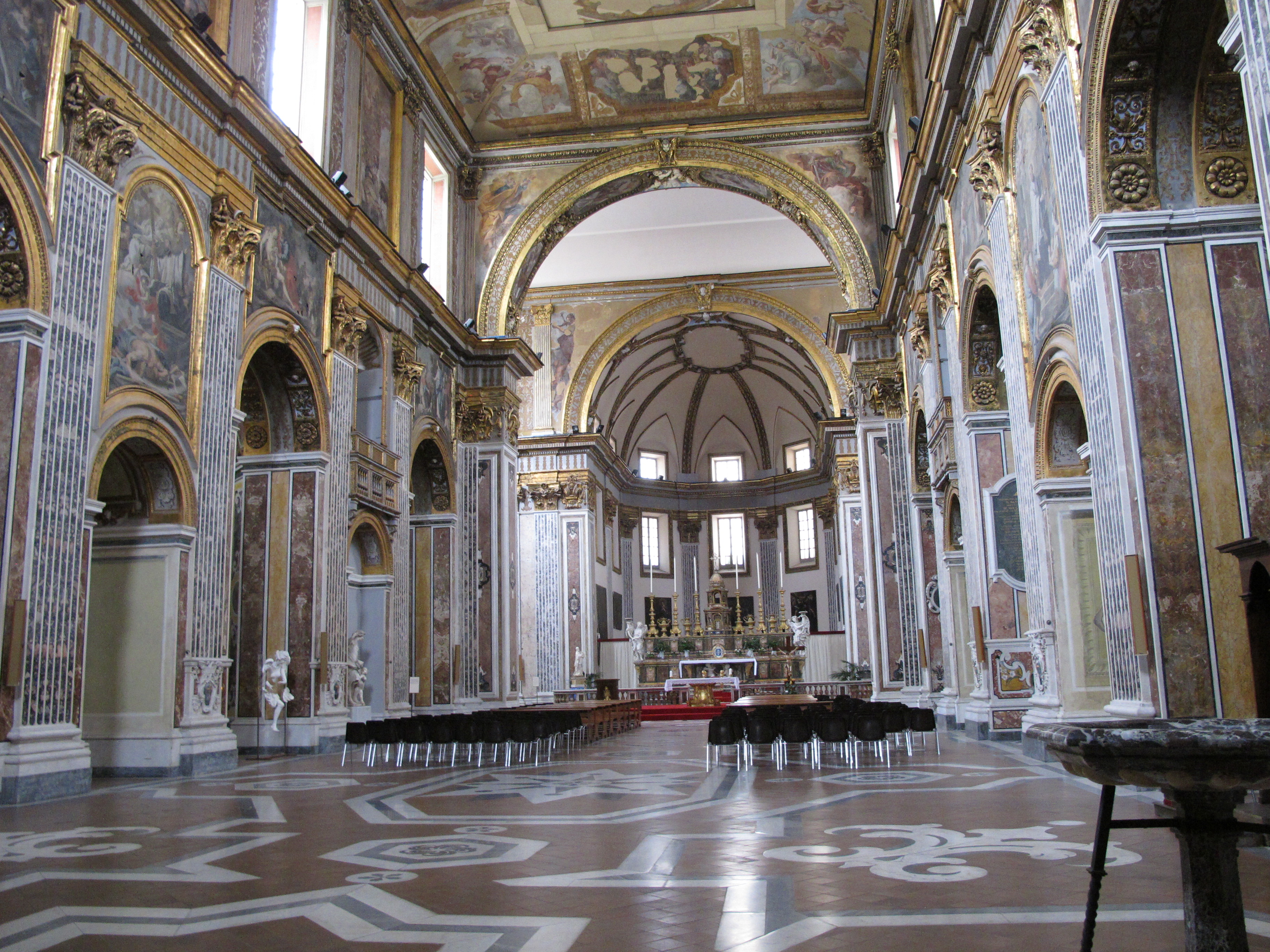 Basilica di San Paolo Maggiore (Napoli).